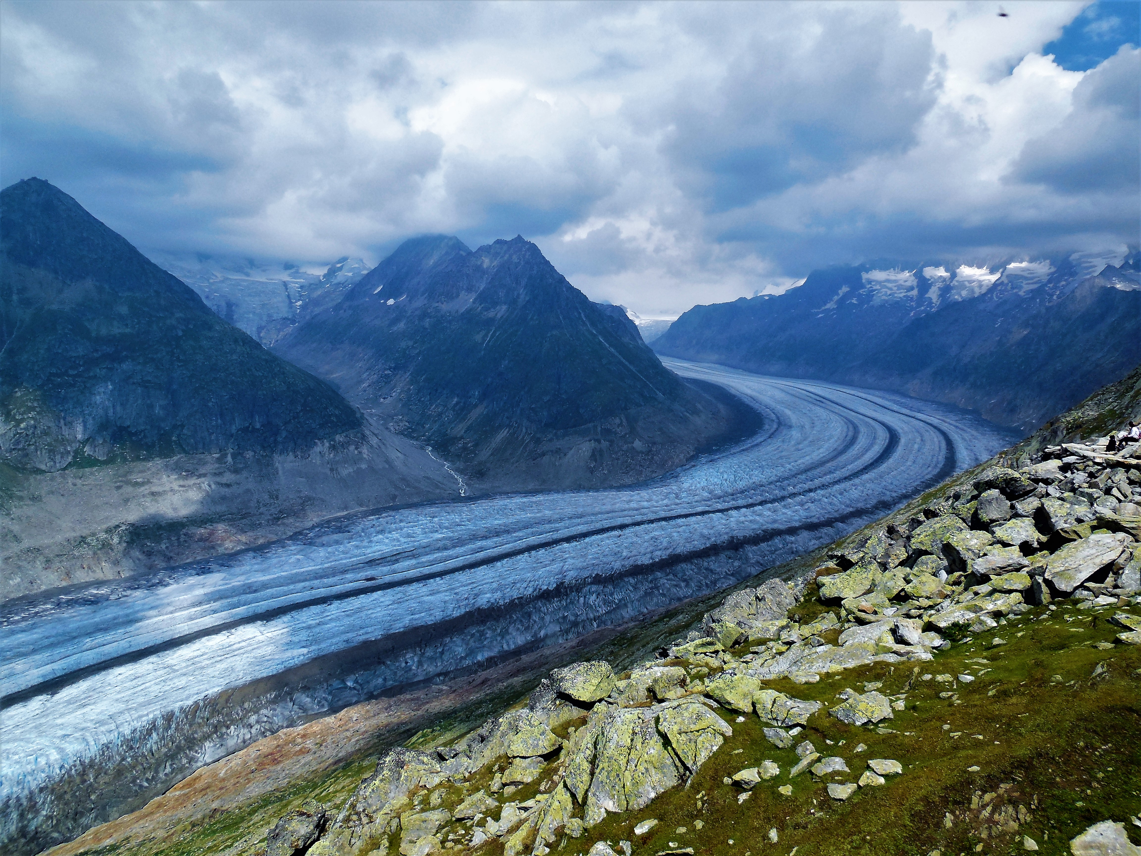 Glacier d'Aletsch en Valais - Suisse